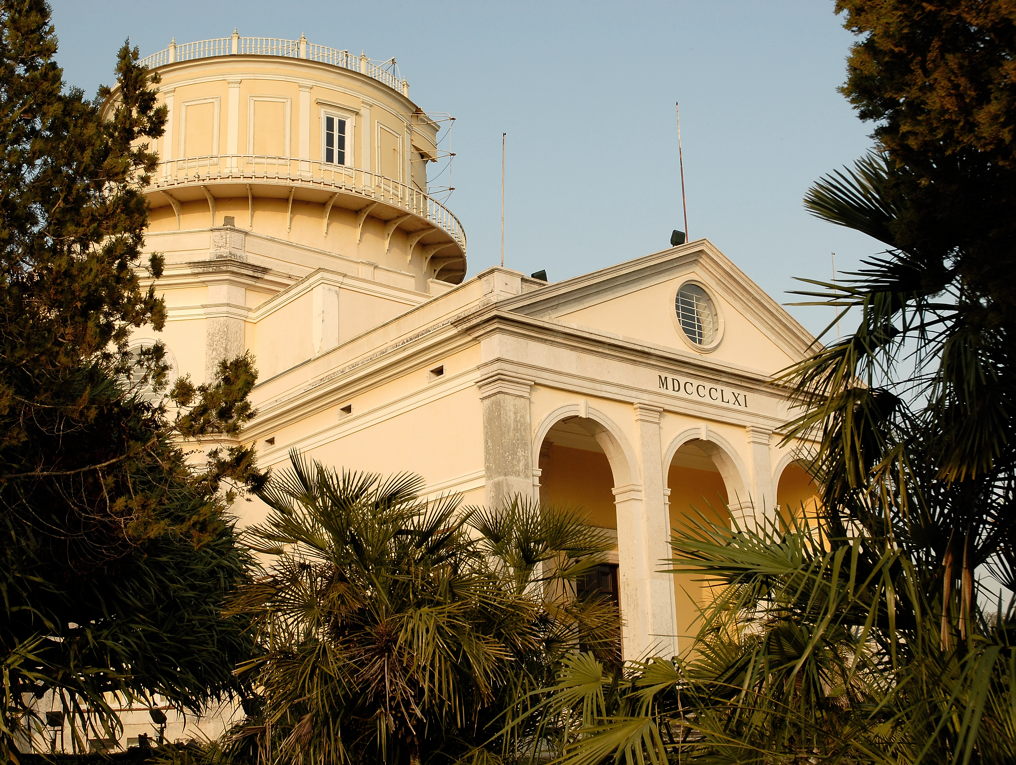 imagem do OAL